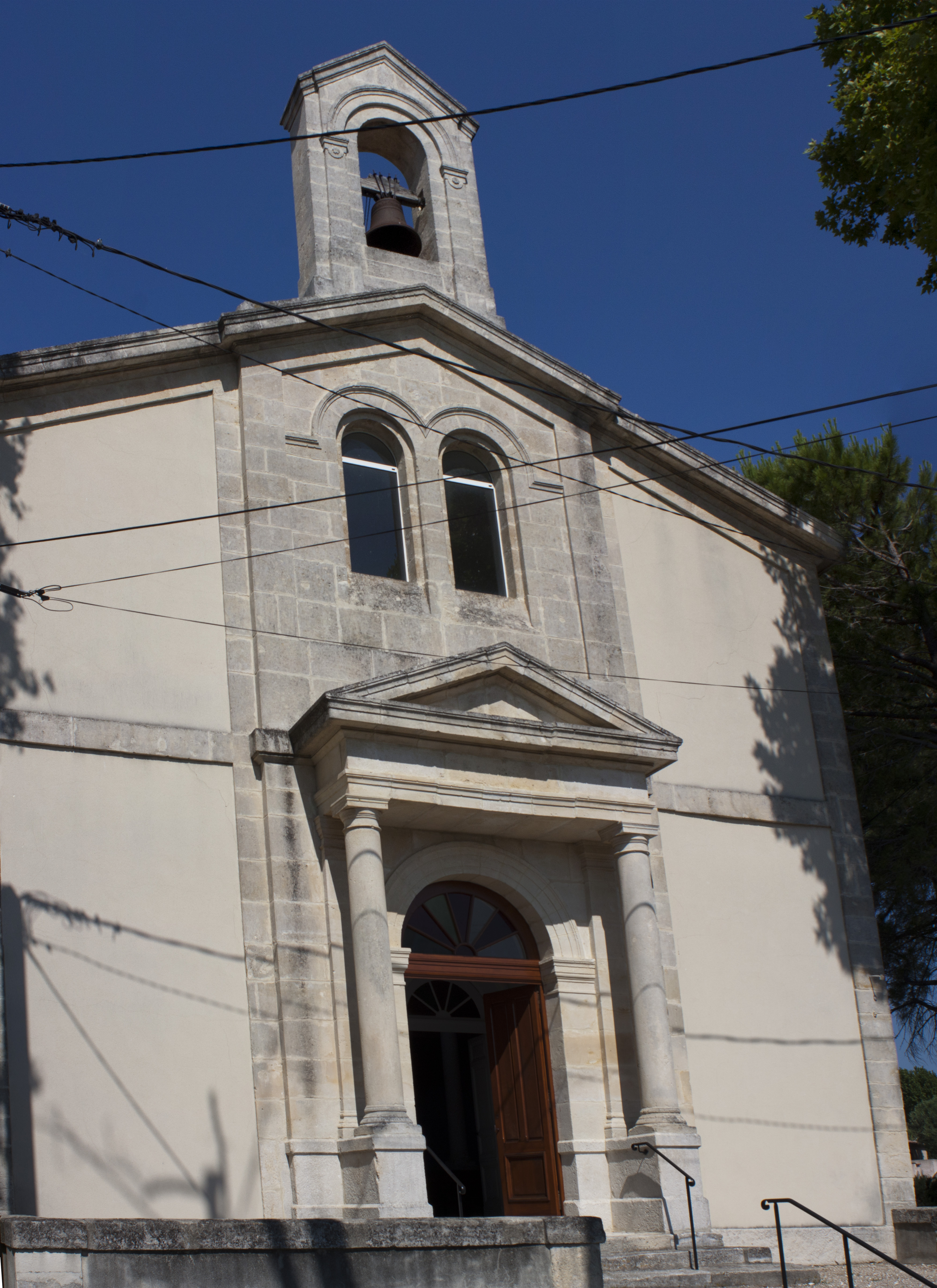 Protestant church of Saint-Côme-et-Maruéjols.